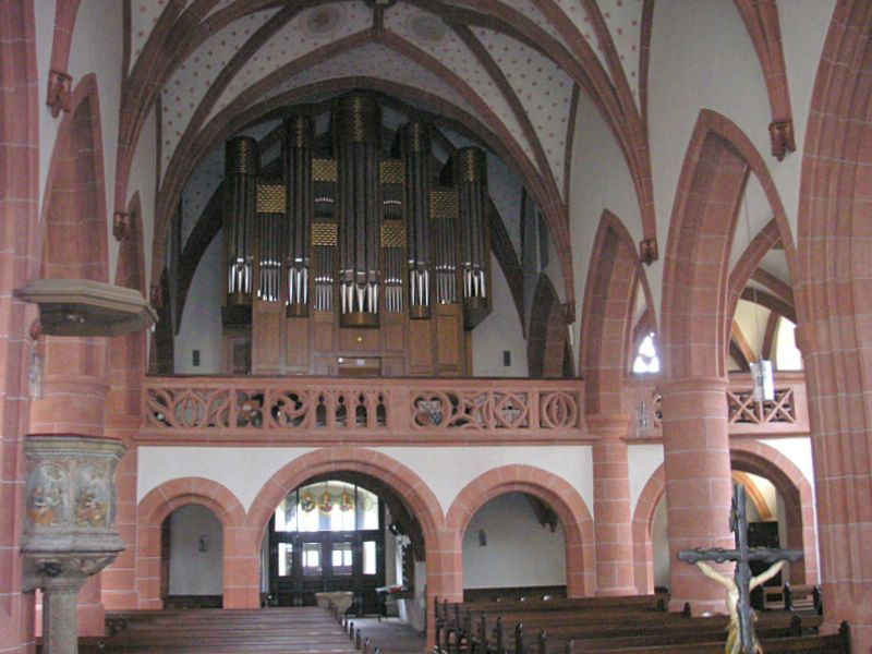 Stadtpfarrkirche St. Laurentius Ebern. Mittelschiff nach Westen. Eigene Aufnahme, April 2005